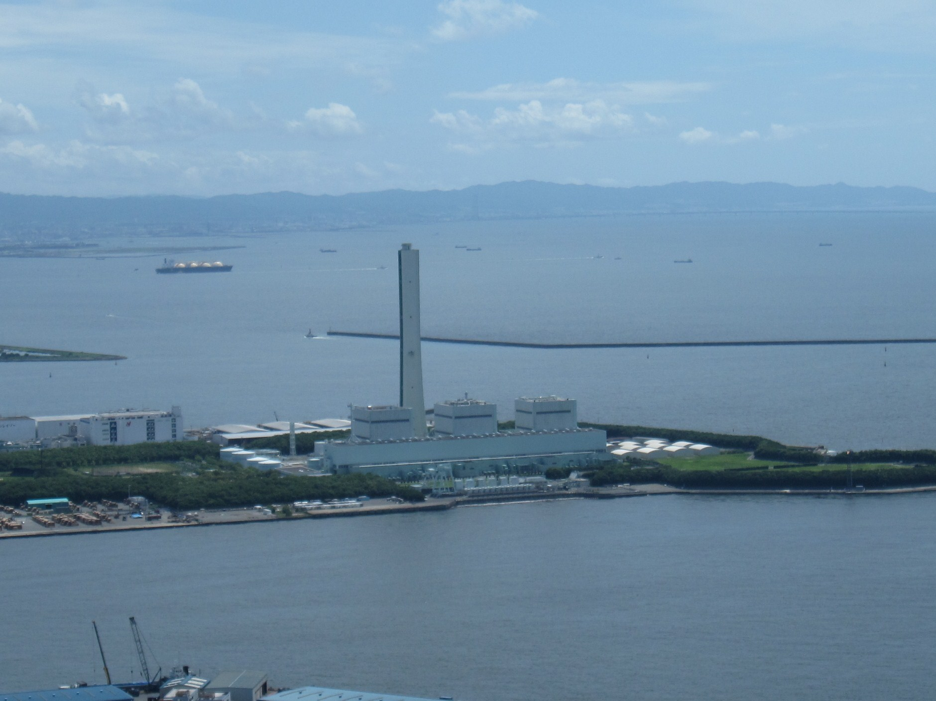 関西電力南港発電所の全景